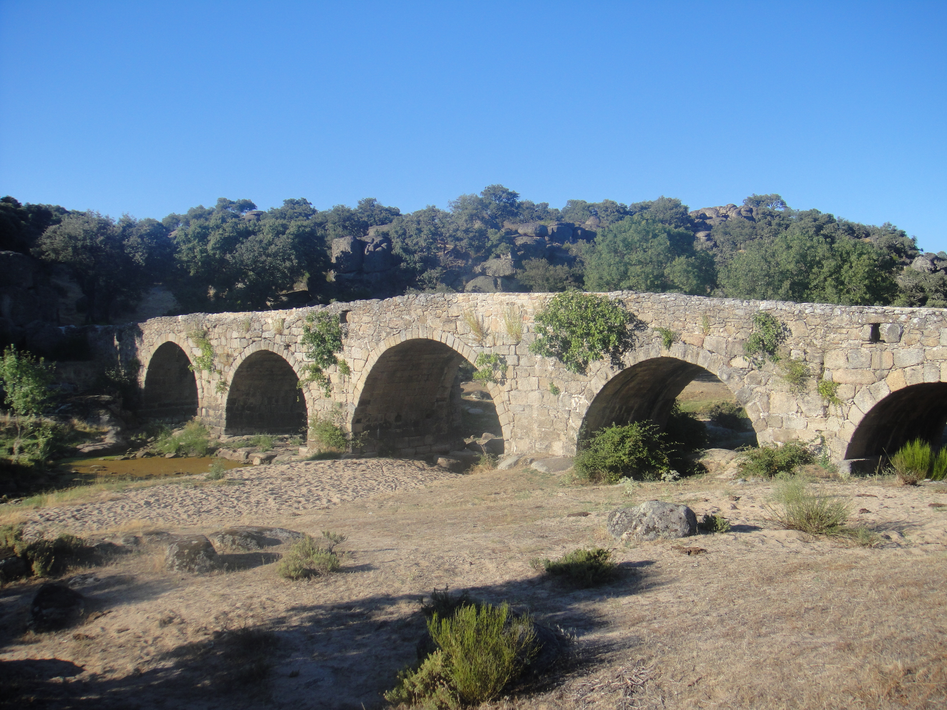 Puente Mocho de Ledesma. Es un puente romano de la época de Augusto, reconstruído en parte en la Edad Media. Se encuentra en la provincia de Salamanca, (España).